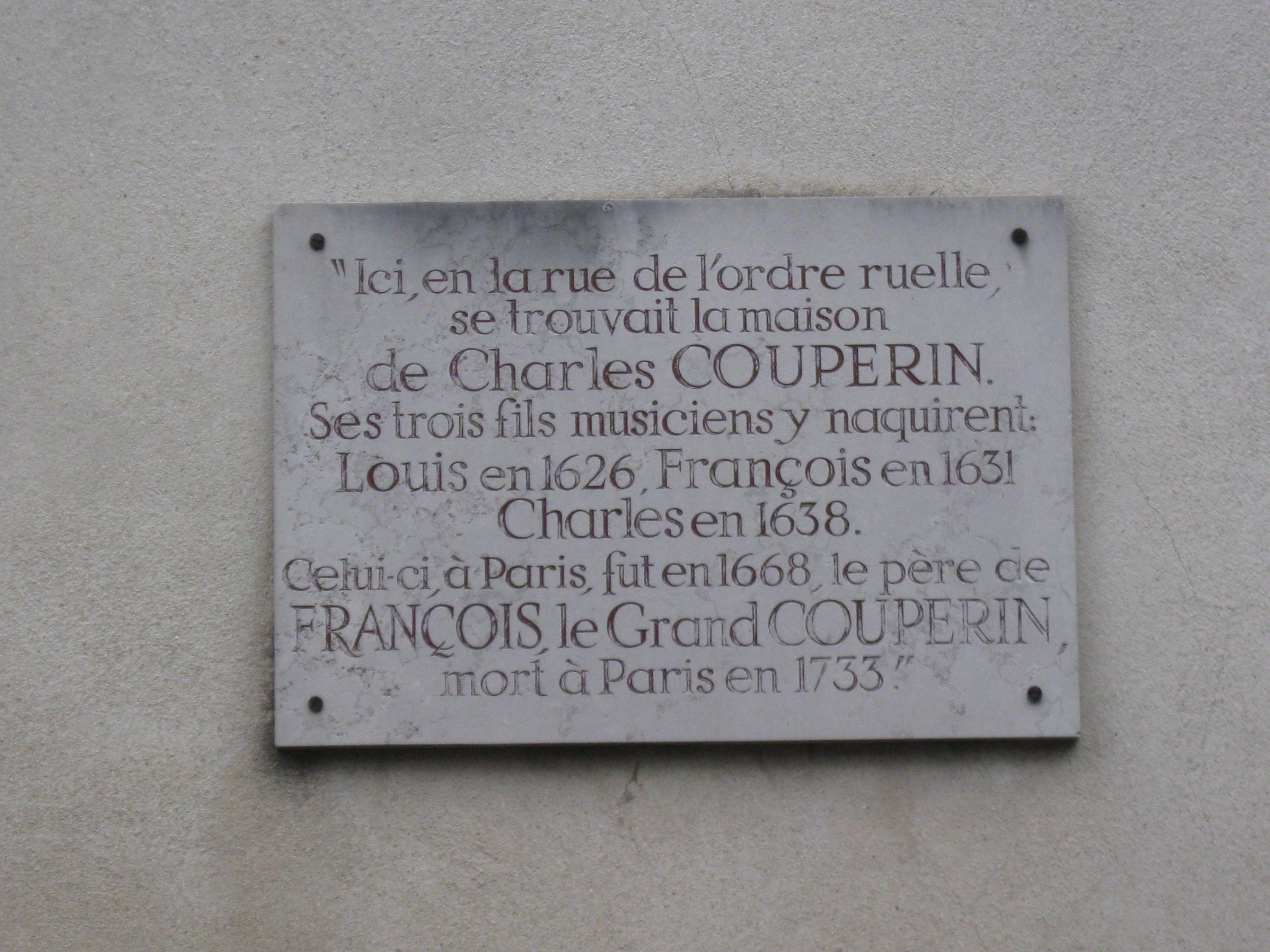 Famille Couperin, plaque commémorative. (Chaumes-en-Brie, Seine-et-Marne, région Île-de-France).